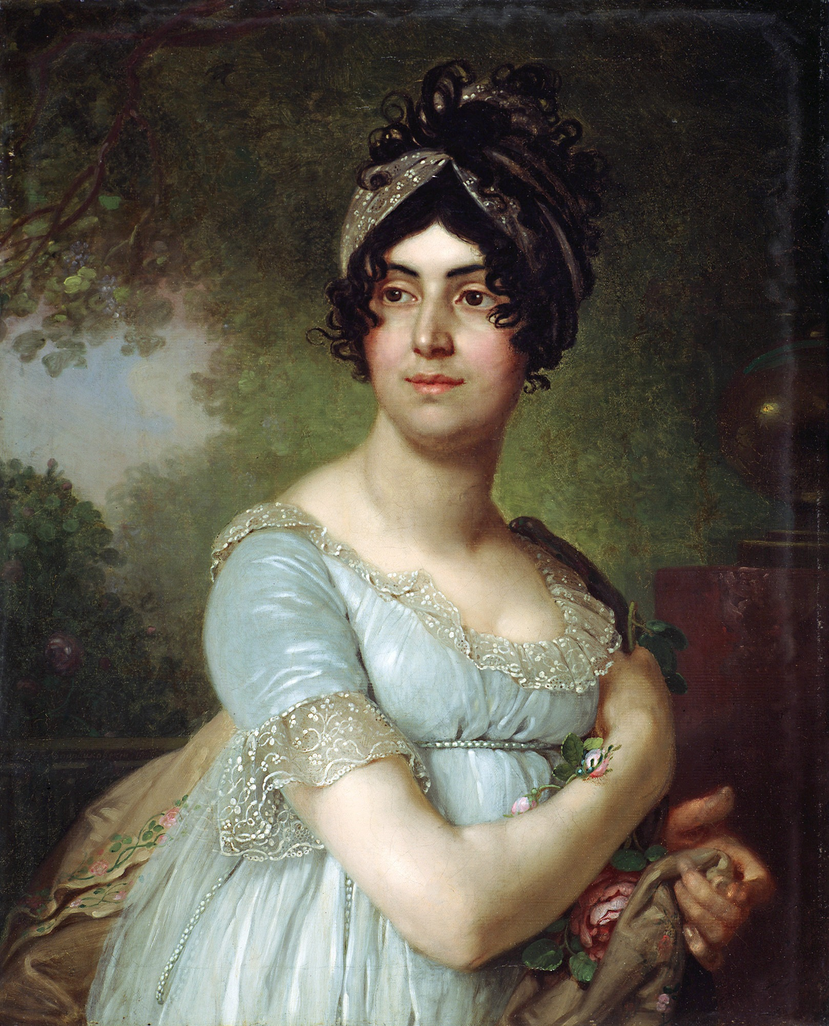 Дарья Семеновна Баратова (конец 1770-х - 1843), происходила из древнего княжеского грузинского рода. В середине 1790-х годов она вышла замуж за богатейшего заводчика Николая Михайловича Яковлева (1761-1813). Дарья Семеновна имела пятерых детей, была доброй и чадолюбивой матерью.